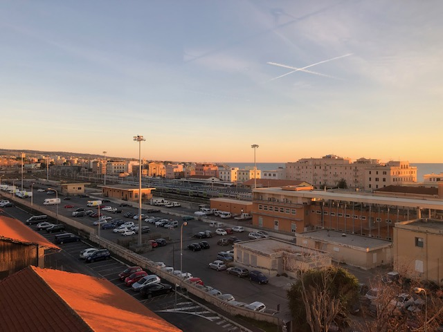 Civitavecchia